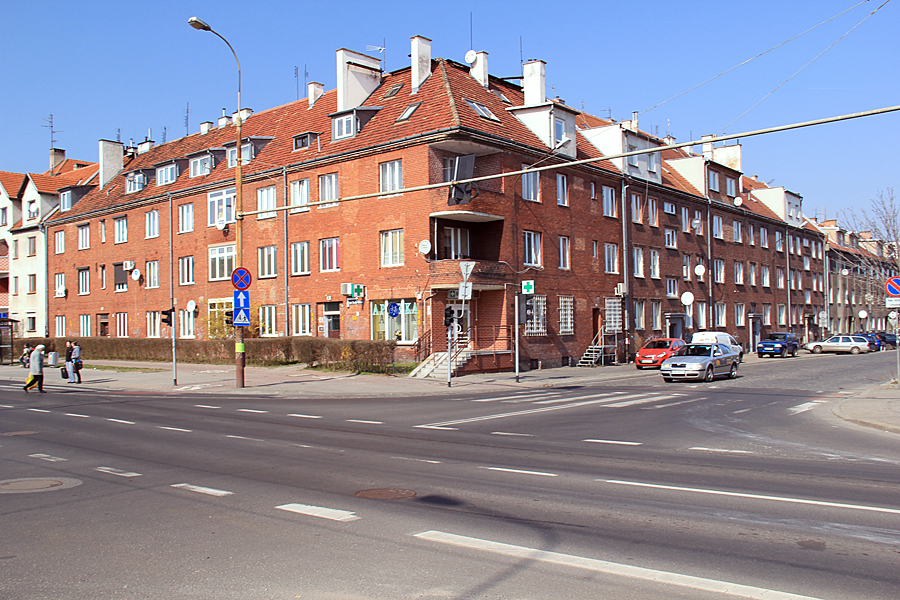 Dawny dom mieszkalny fundacji Östreicherów